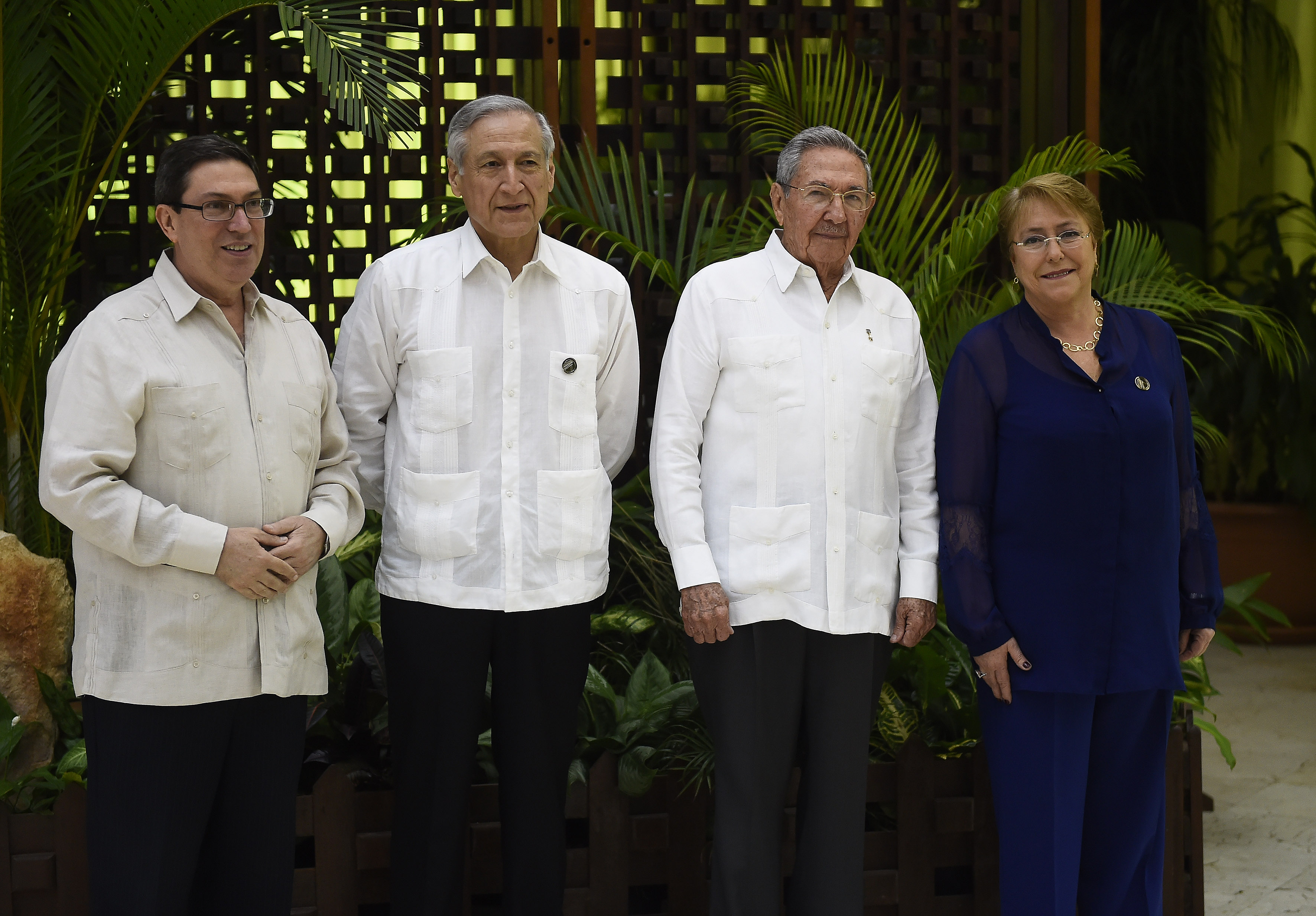 Gobierno de Chile. La Presidenta de Chile Michelle Bachelet participó en la ceremonia de Firma de Cese al Fuego del Diálogo de Paz.